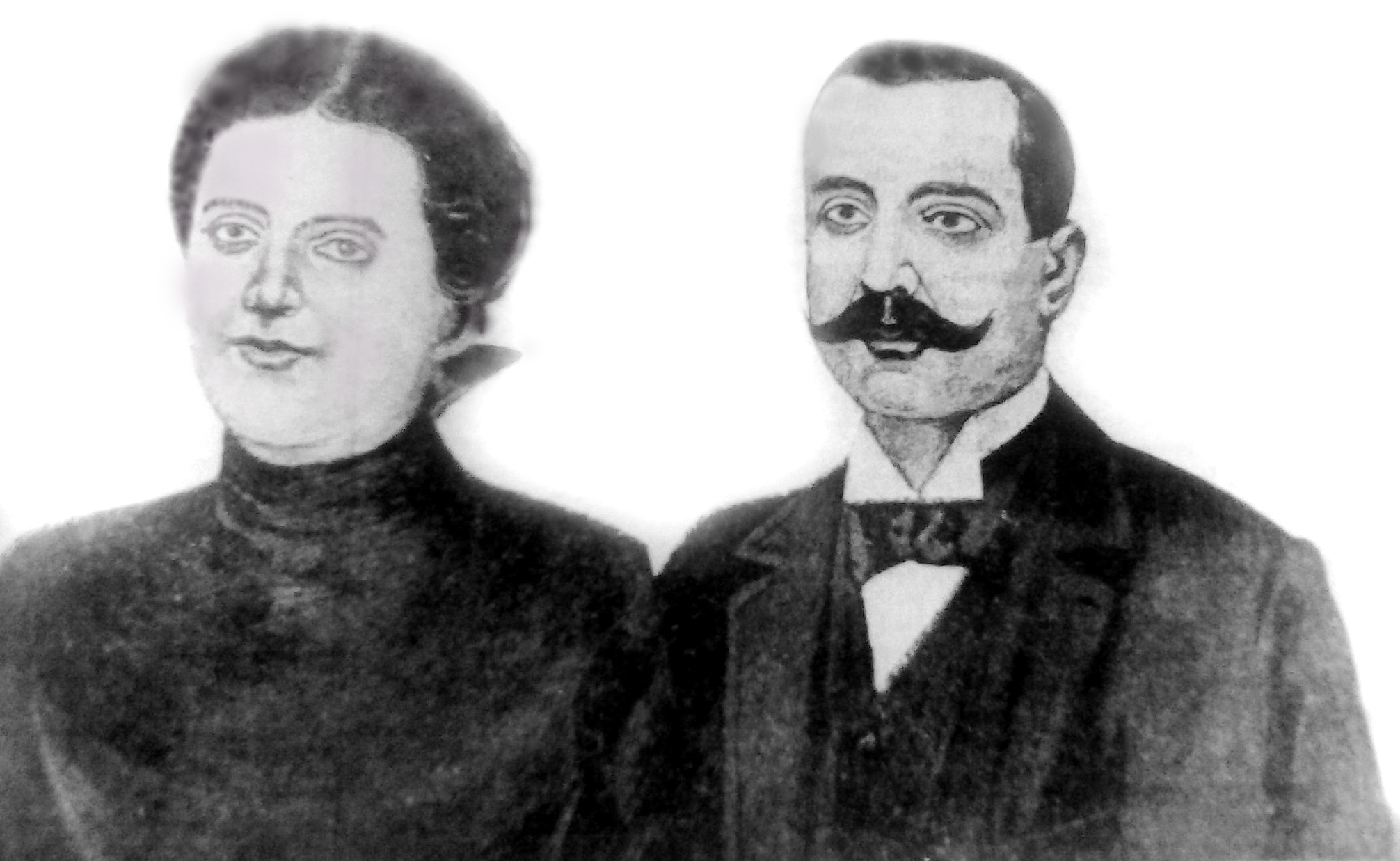 un'immagine dei coniugi Cuocolo, uccisi a Napoli nel 1906.